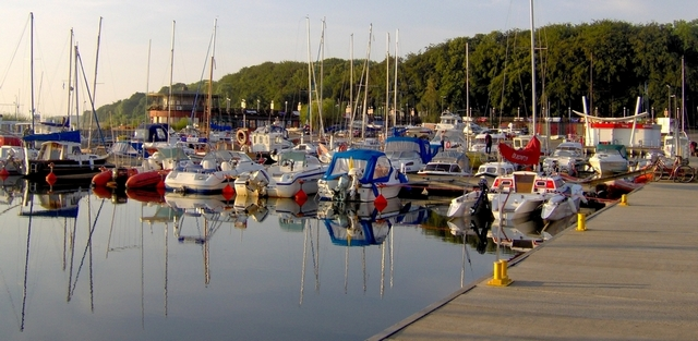 marina, Puck, Poland, summer 2006 Autor: Krzysztof